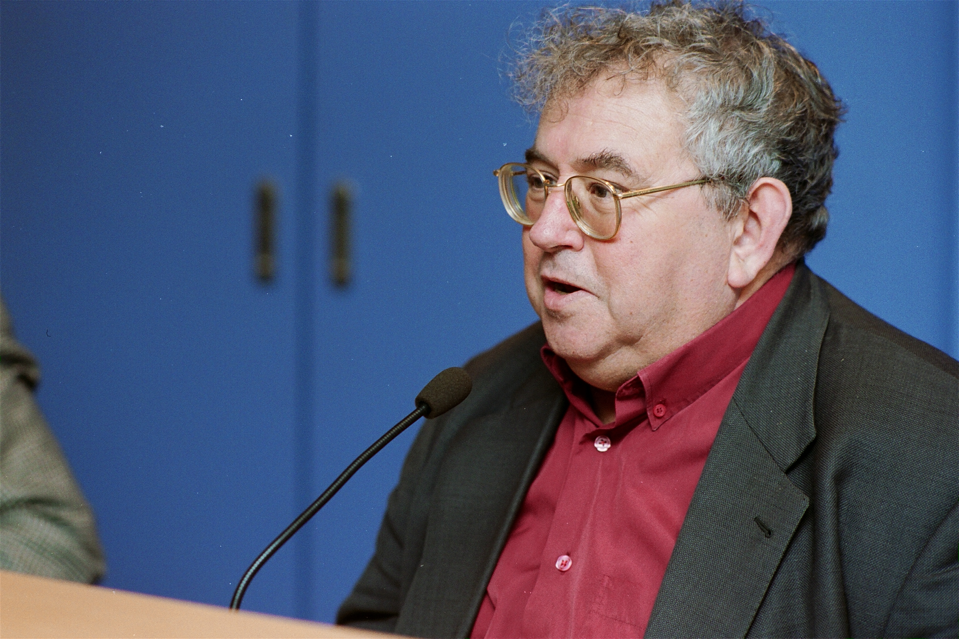 Ignasi Riera al MHC el 2001.